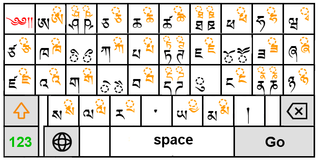 Gboardのチベット語キーボード。